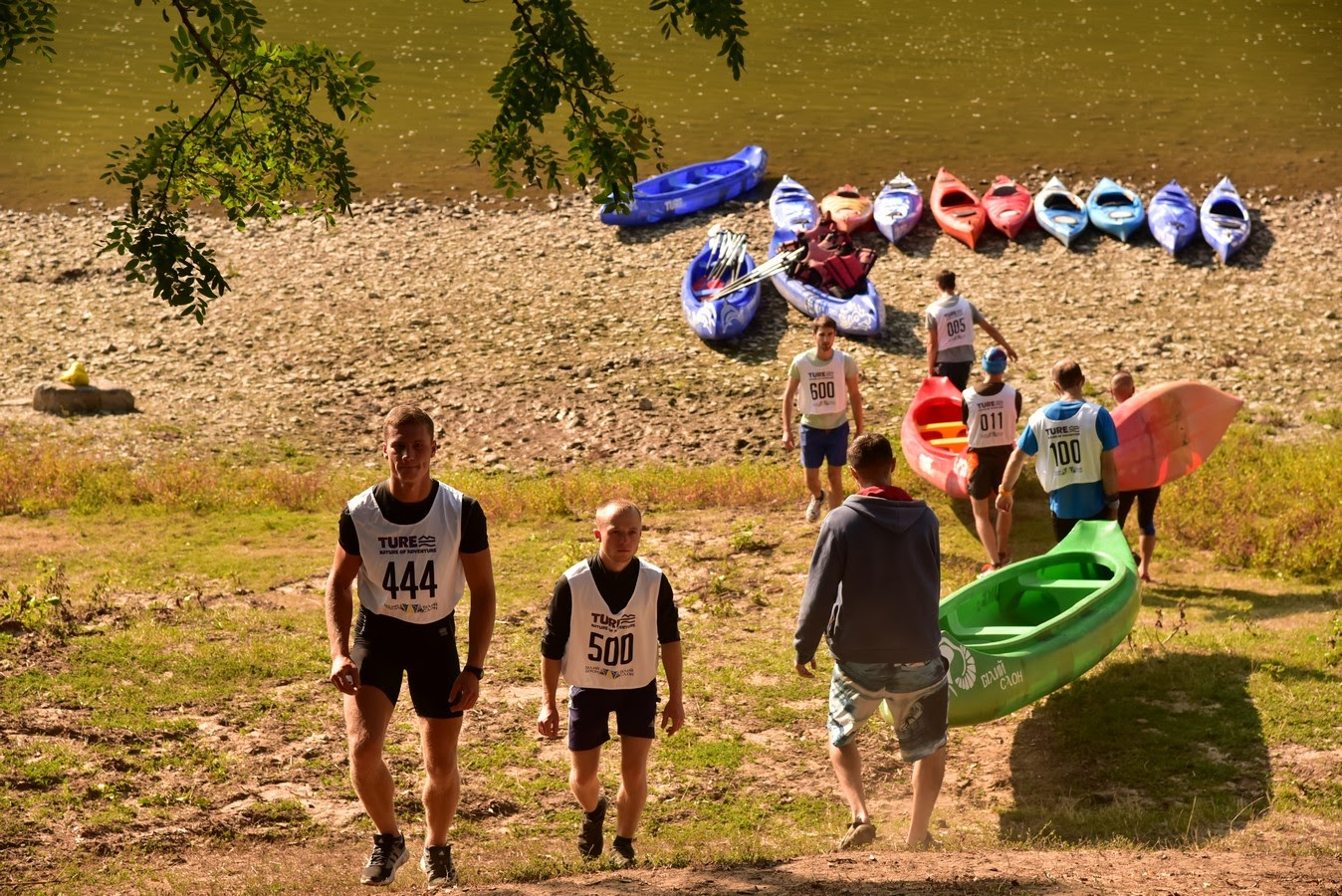 с. Лука, що над Дністром